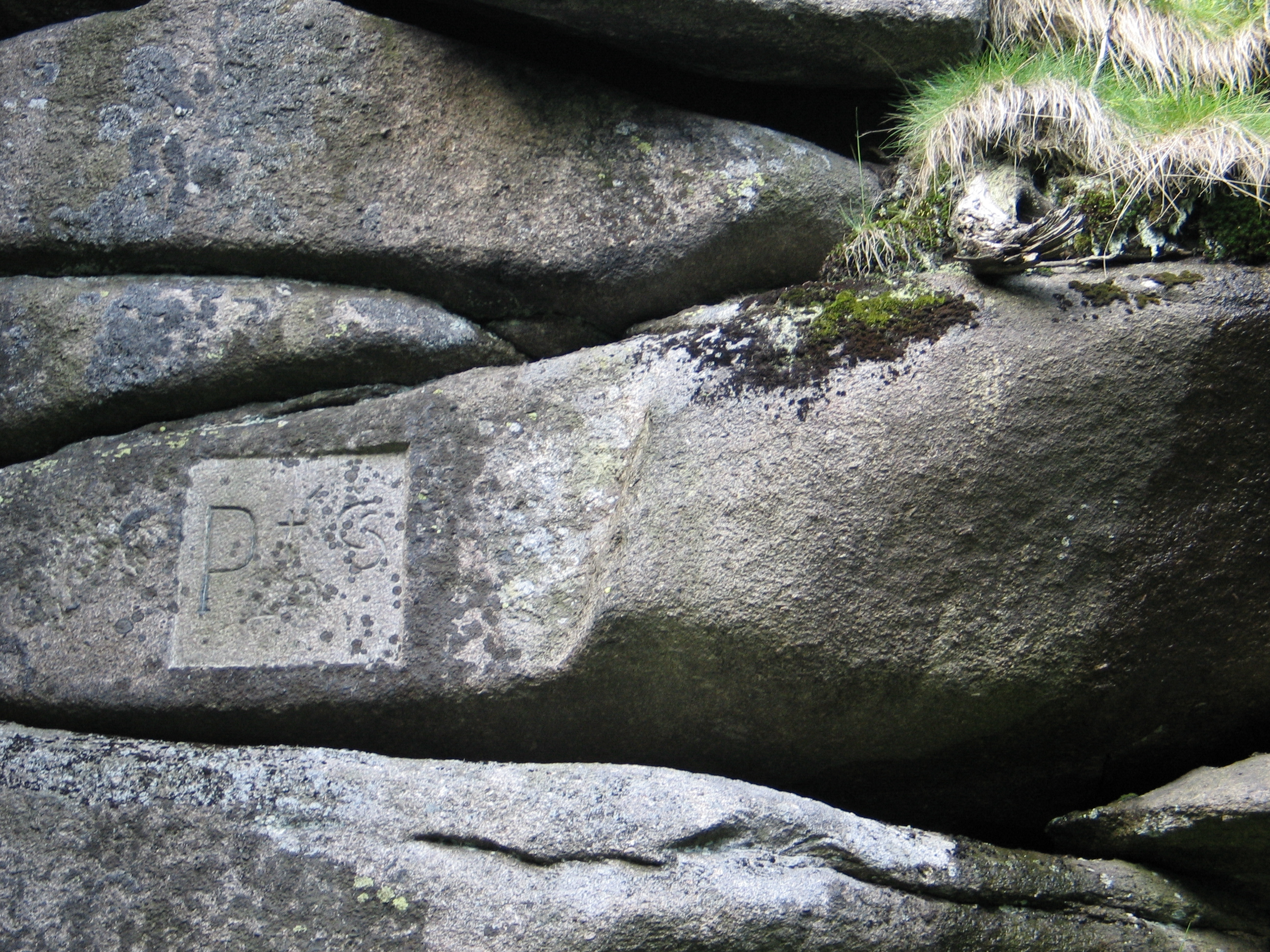 Dawny znak graniczny na wzgórzu Kocierz